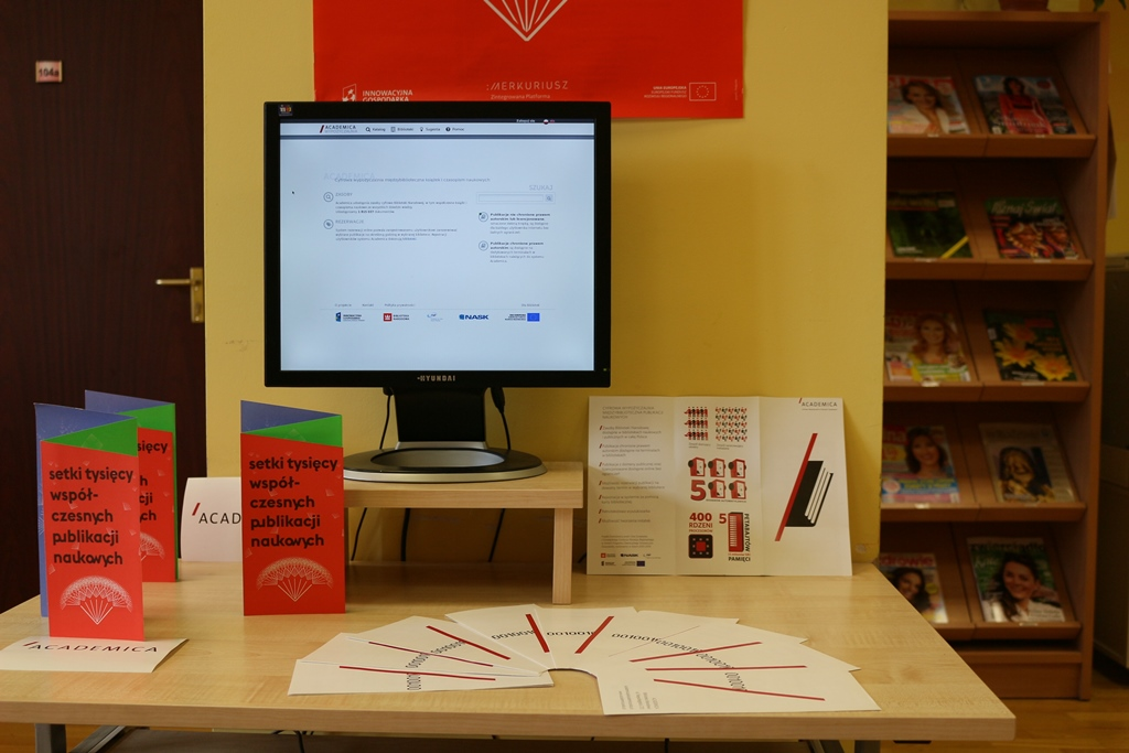 Zdjęcie przedstawiające terminal Academiki w MBP w Chojnicach